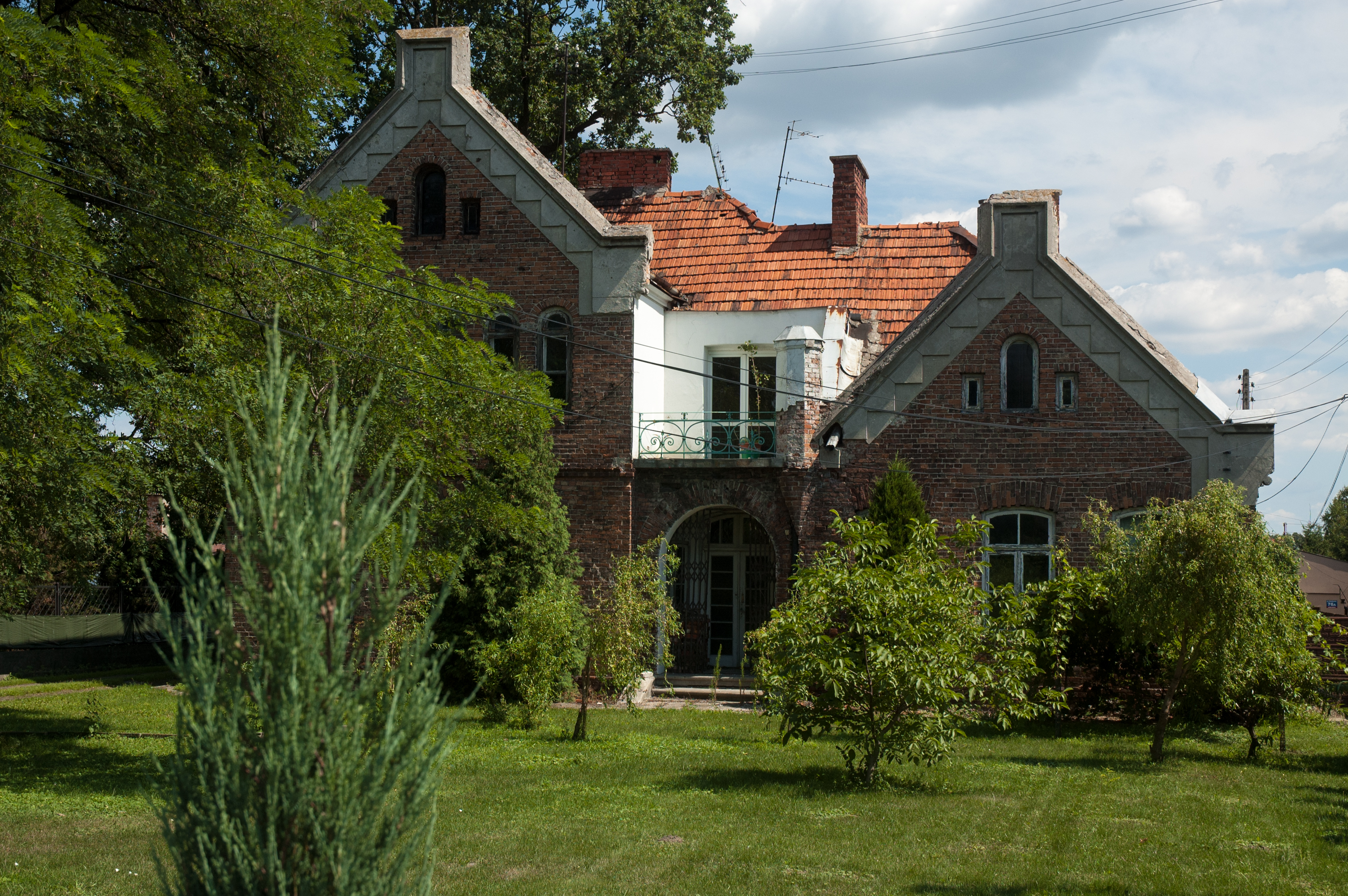 Zabytkowa willa z pocz. XX wieku - Jabłonna ul. Modlińska 78